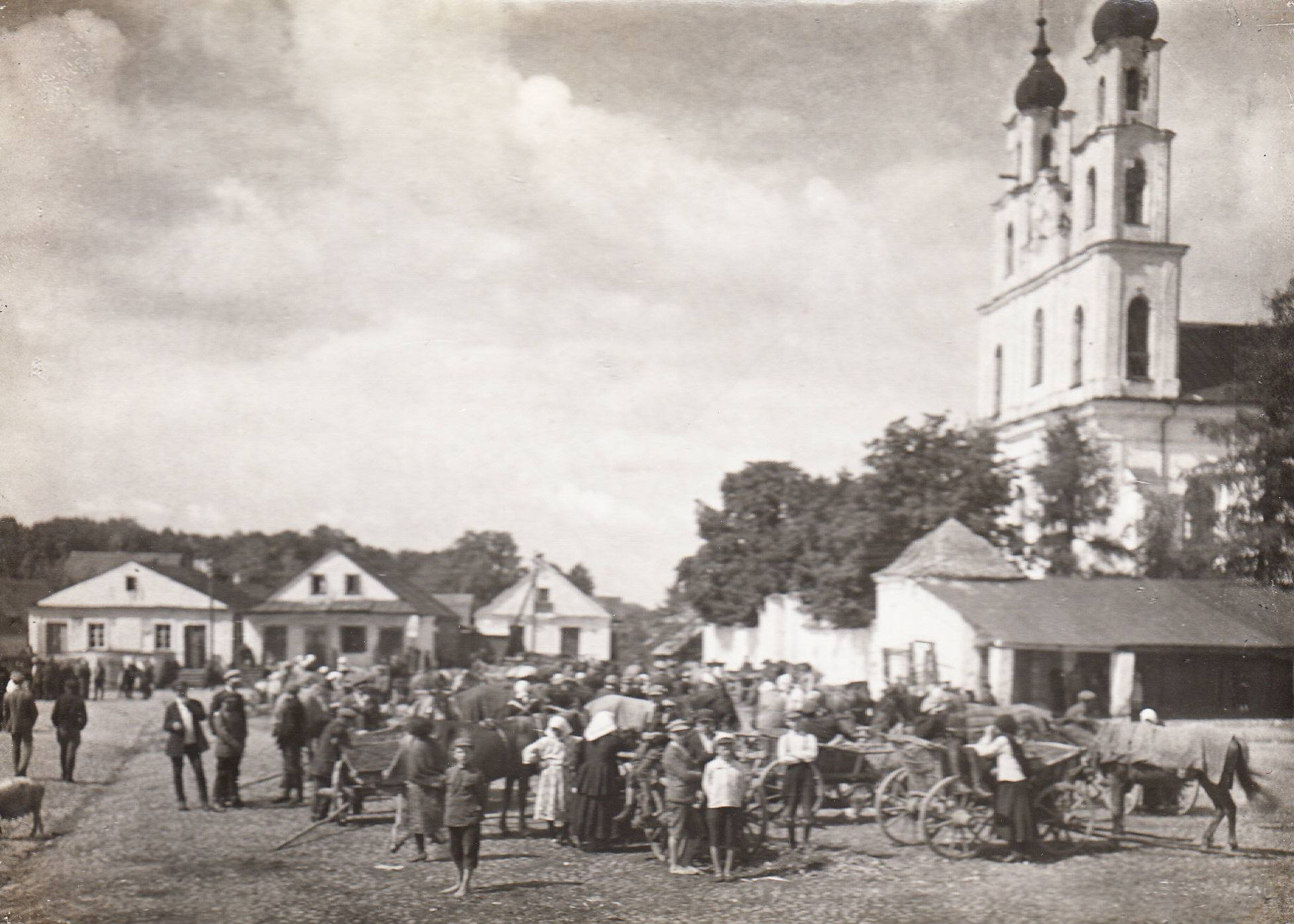 Беларуская (тарашкевіца): Зьдзецел (Ździecieł), пляц Рынак (plac Rynak)